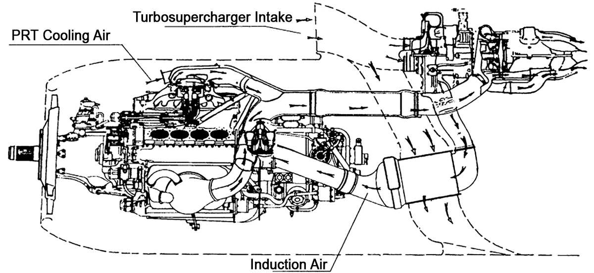 WD-4K